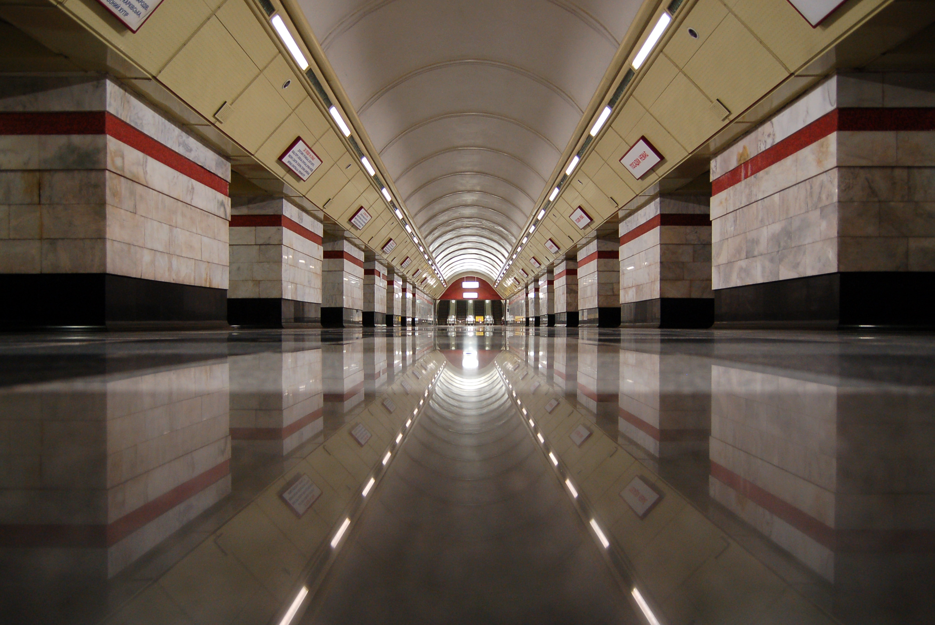 Cтанция метро «Сырец», центральный зал